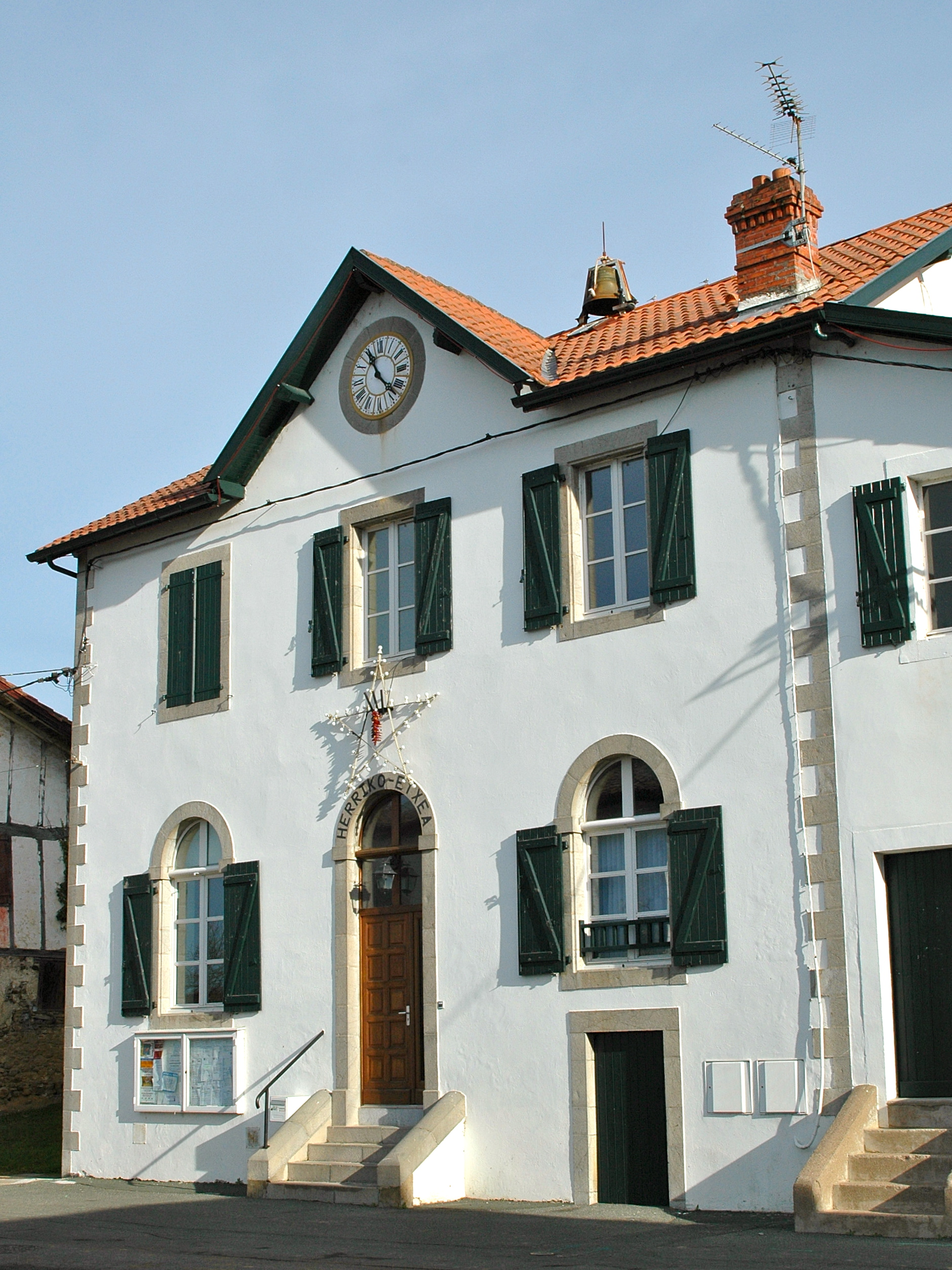 Halsou, la mairie. photo prise le 31/12/06 par Harrieta171